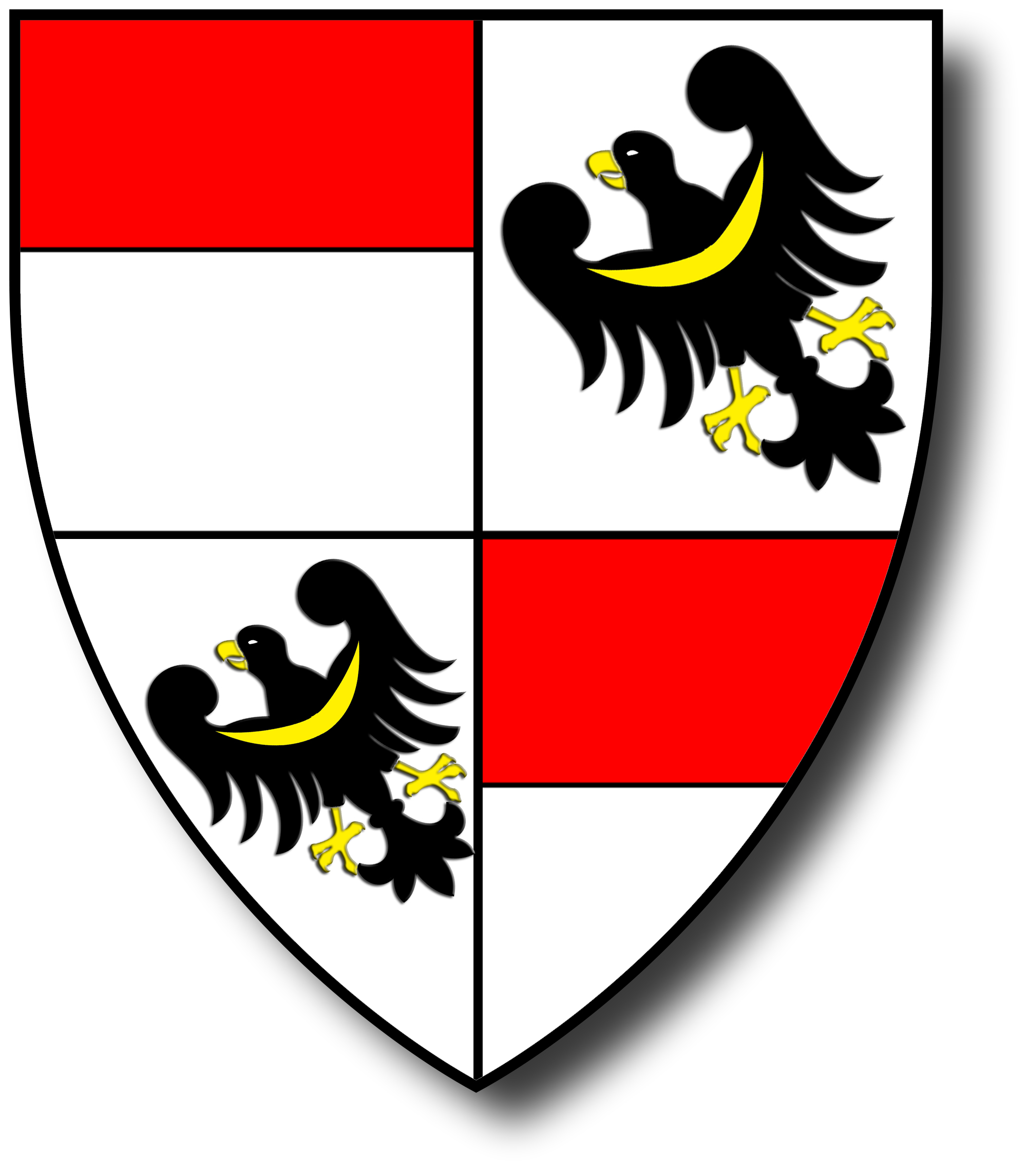 Česky: Erb Hasištejnských z Lobkovic